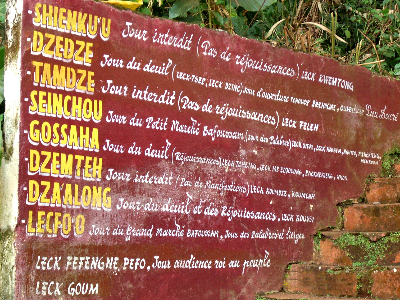 Chefferie Bafoussam - Jours de la semaine